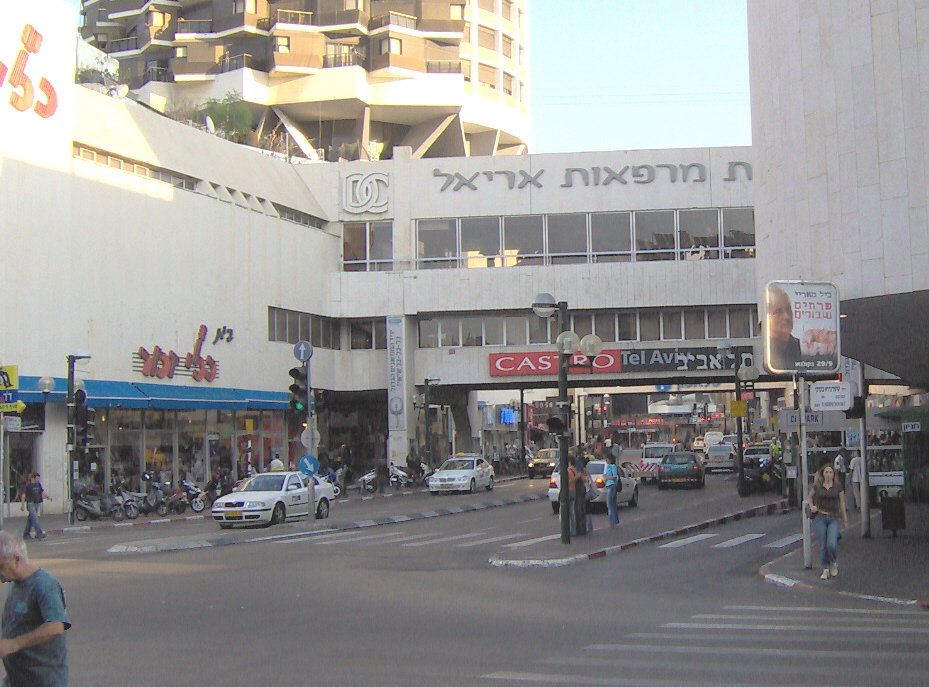 דיזנגוף סנטר מבחוץ